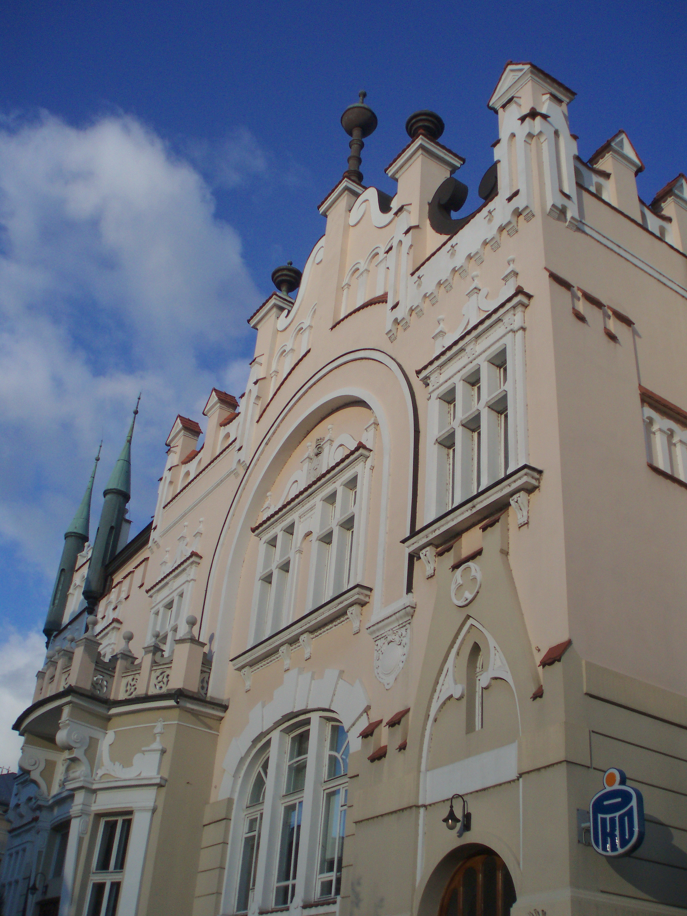 Rzeszów, ul. 3 Maja 23 - dawna Kasa Oszczędnościowa, obecnie bank PKO BP